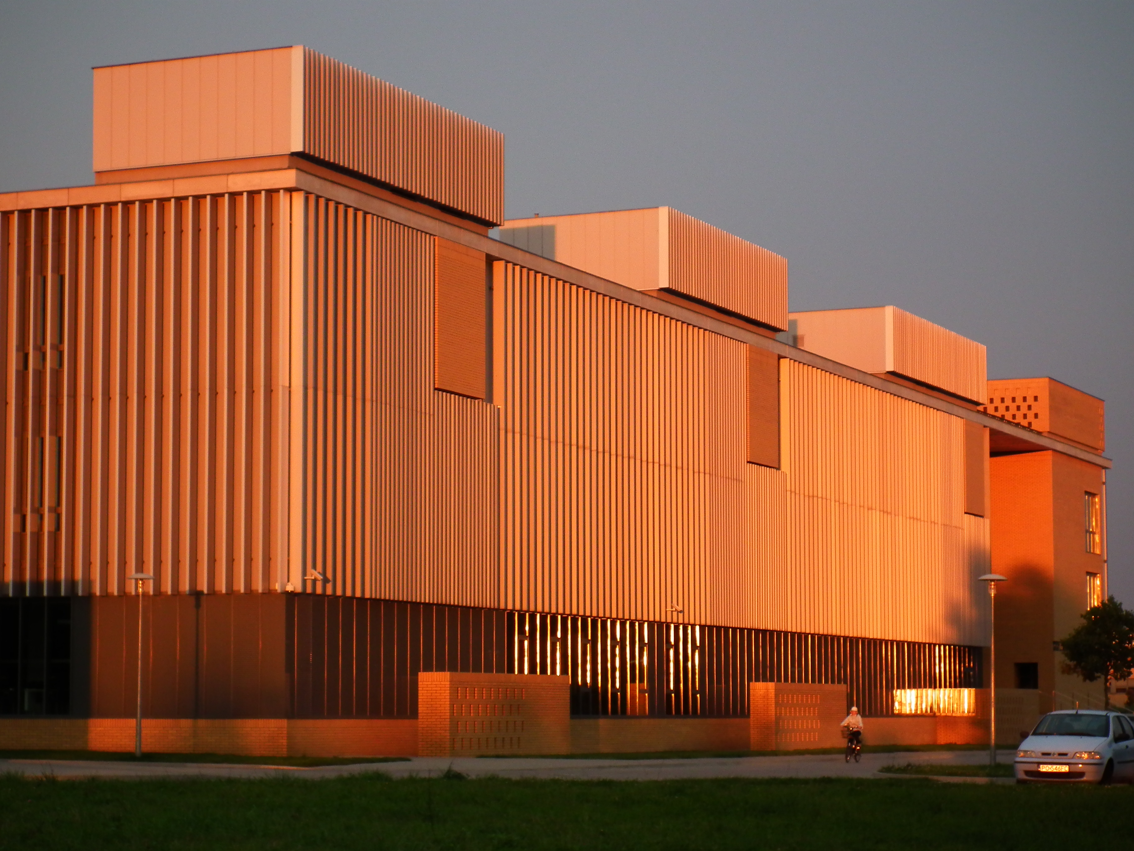 Zmierzch na Kampusie Morasko w Poznaniu. Collegium Historicum.